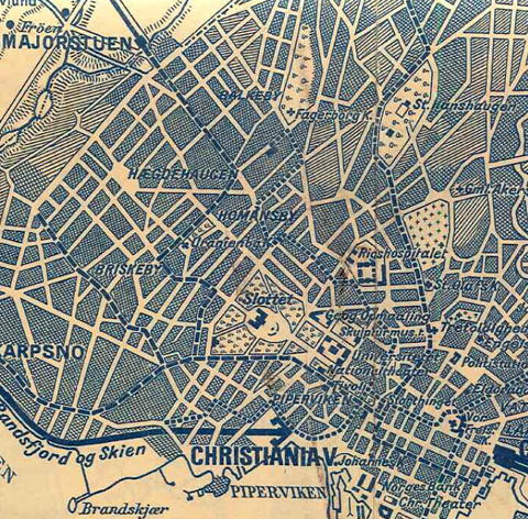 Gammelt kart som viser Briskebylinjens trasé.